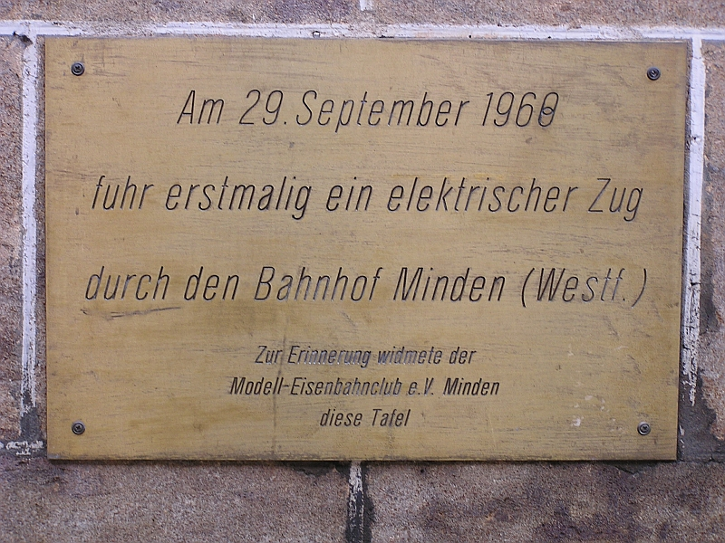 Plakette am Bahnhof Minden (Westf.) in Minden, Nordrhein-Westfalen. Der Bahnhof war einst Endpunkt der Stammstrecke (heute Abschnitt Hamm-Minden der Köln-Mindener Eisenbahn-Gesellschaft und fest in die Anlagen der preußischen Festung Minden integriert. Die Plakette erinnert an die Elektrifizierung dieser Strecke im Jahr 1968. Inschrift: Am 29. September 1968fuhr erstmalig ein elektrischer Zugdurch den Bahnhof Minden (Westf.)Zur Erinnerung widmete derModell-Esenbahnclub e.V. Minden diese Tafel